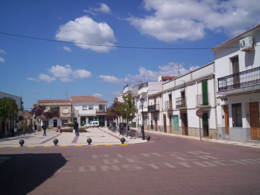 Plaza de la Constitución de Chillón (Ciudad Real)